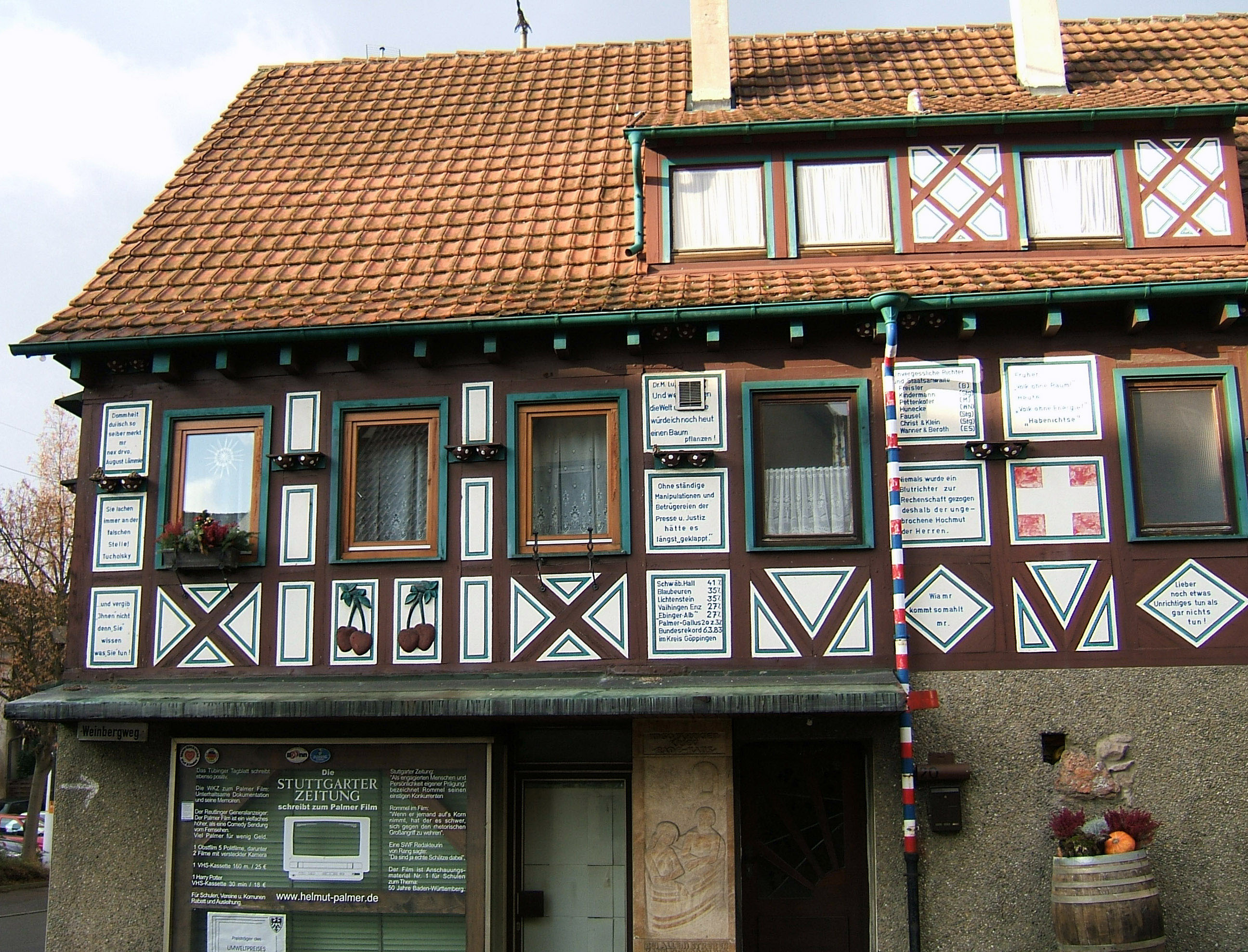 Das Haus von Helmut Palmer in Remshalden-Geradstetten in Deutschland. Das Fachwerkhaus ist über und über mit Parolen, Statements, Daten, Wappen und anderem geschmückt. Einige Zitate: "Unruhe ist erste Bürgerpflicht""Lieber Stein des Anstosses als anstössig""Ein kleiner Spatz wies Amtsleuten den Weg""Eine geniale Leistung des Schneiders von Ulm vom simplen Volk verkannt und verspottet""Dommheit dui isch so: selbr merkt mr nex drvo""Und vergib ihnen nicht, denn sie wissen, was sie tun"